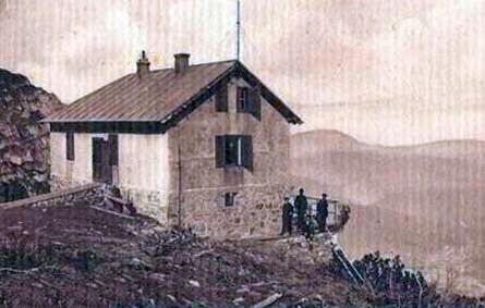 Cantonul Schiel de pe creasta Muntelui Jepi din Muntii Bucegi